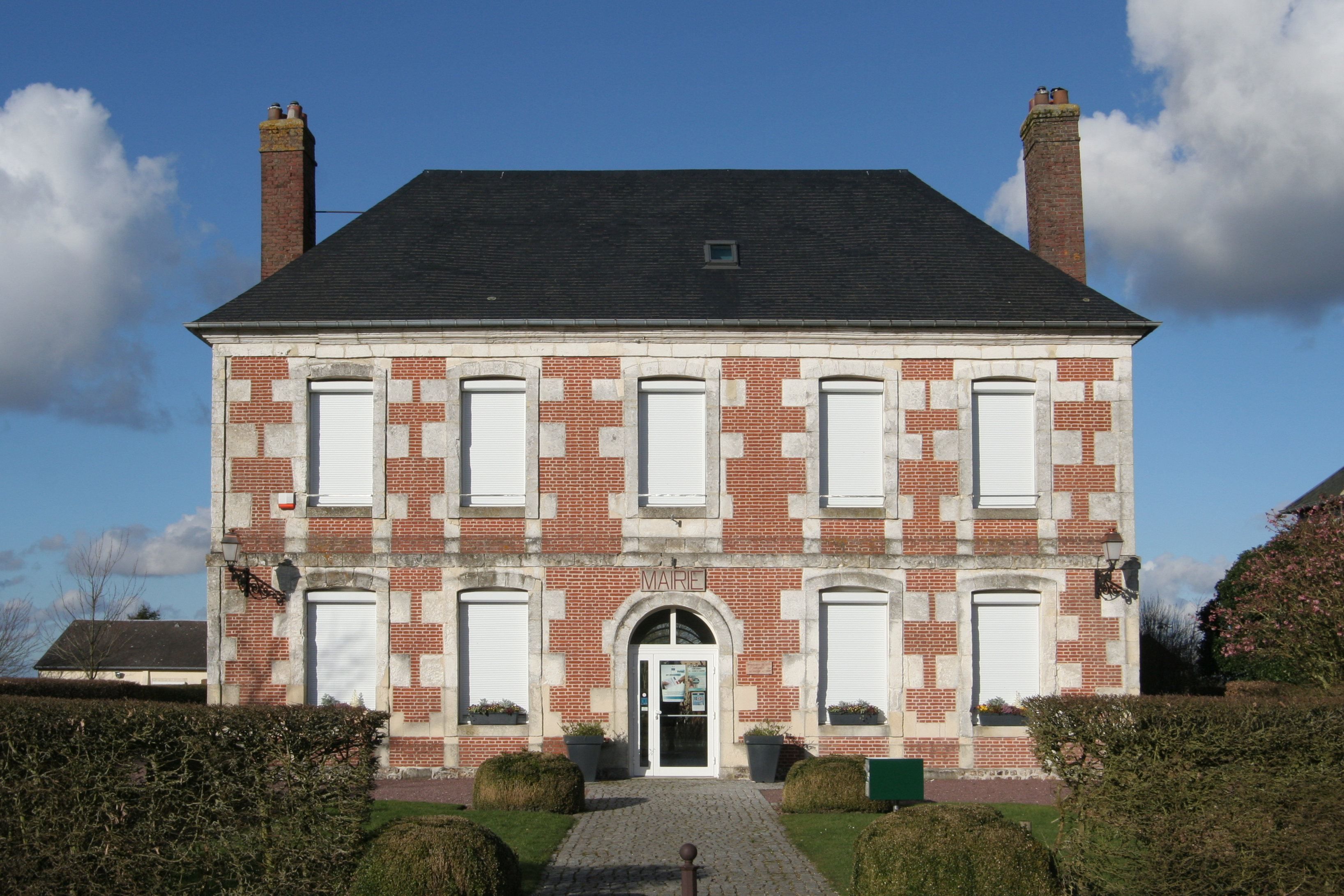 Mairie de Saint-Jean-de-Folleville.